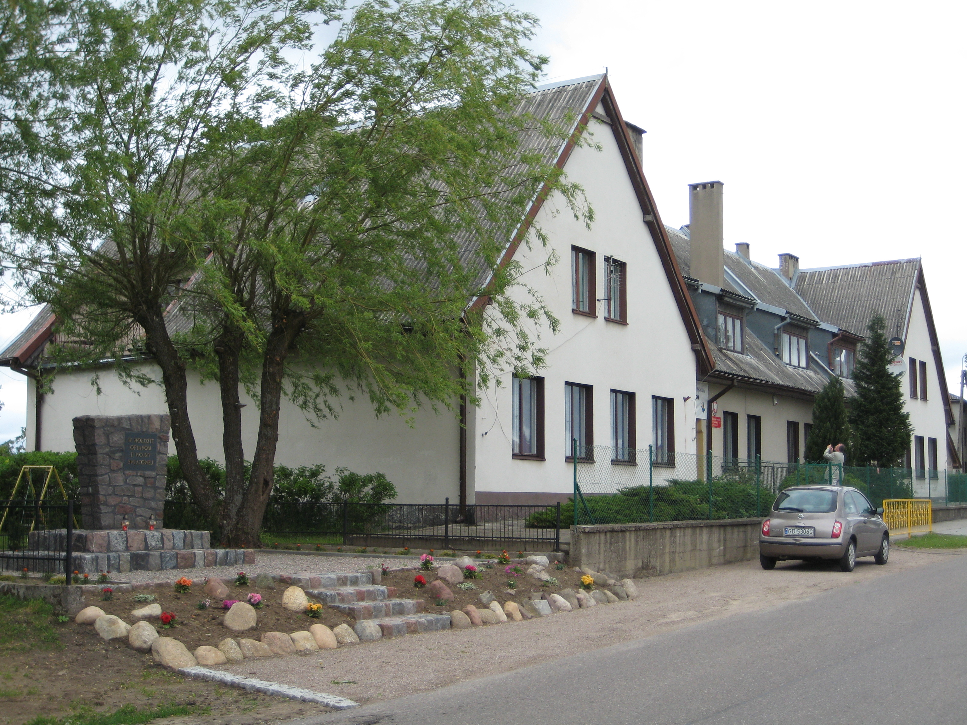 School in Podjazy im Danuty Siedzikówny "Inki"